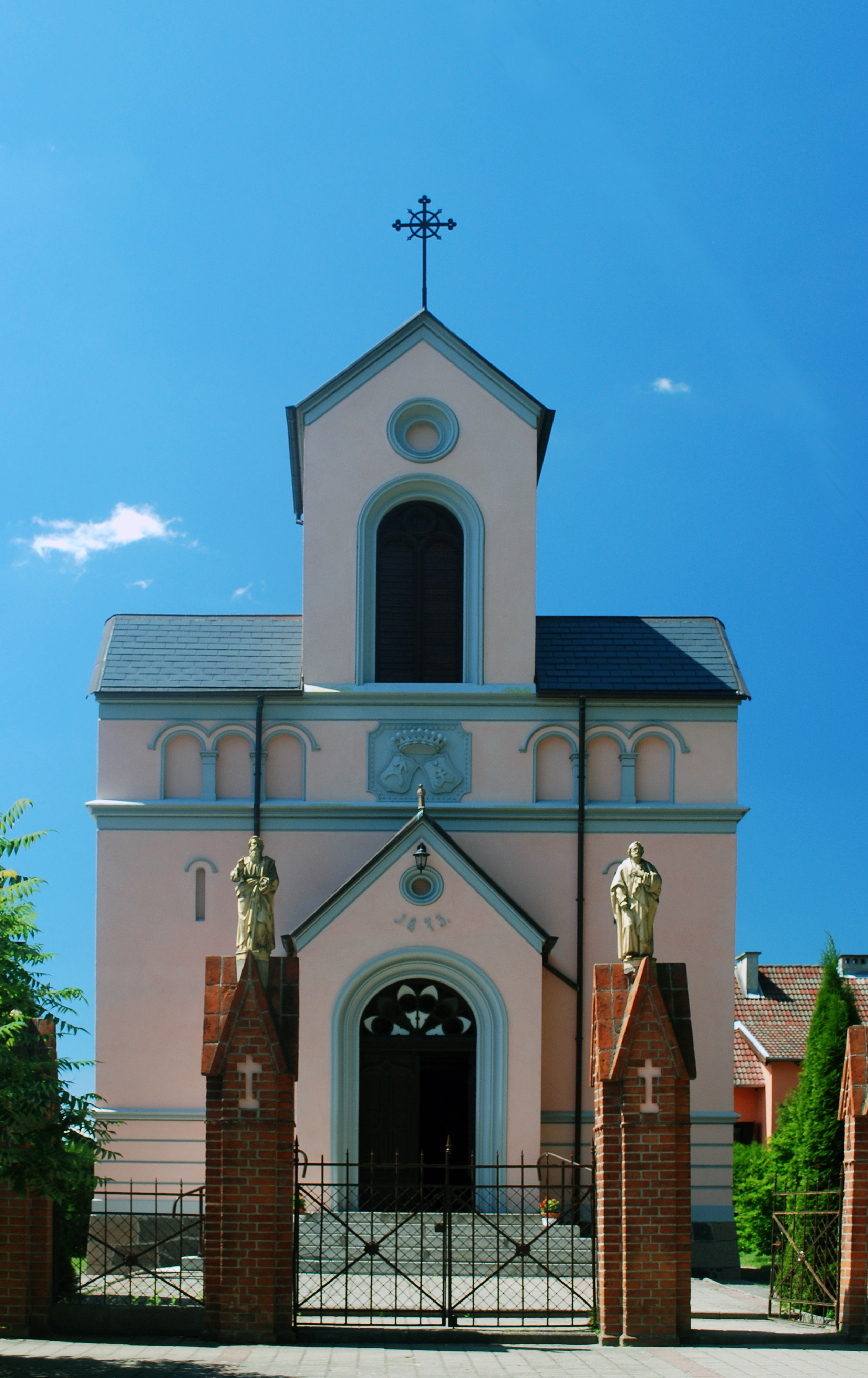 Waplewo Wielkie - dawna kaplica grobowa Sierakowskich, obecnie rzymskokatolicki kościół parafialny p.w. św. Maksymiliana Marii Kolbego, 1873.